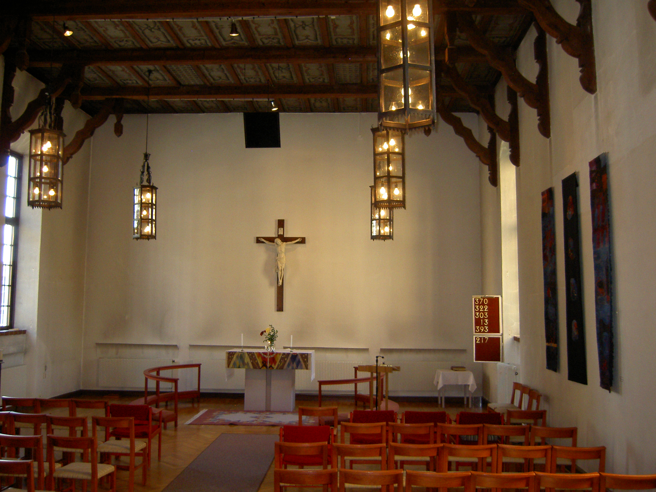 Kyrksal